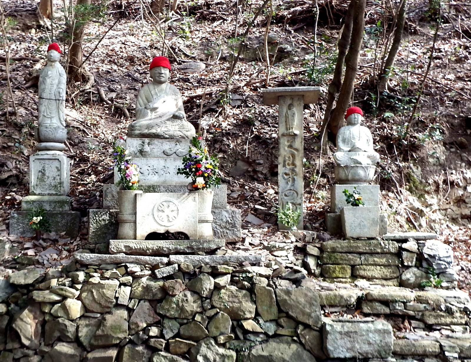 屋島の喰わず梨